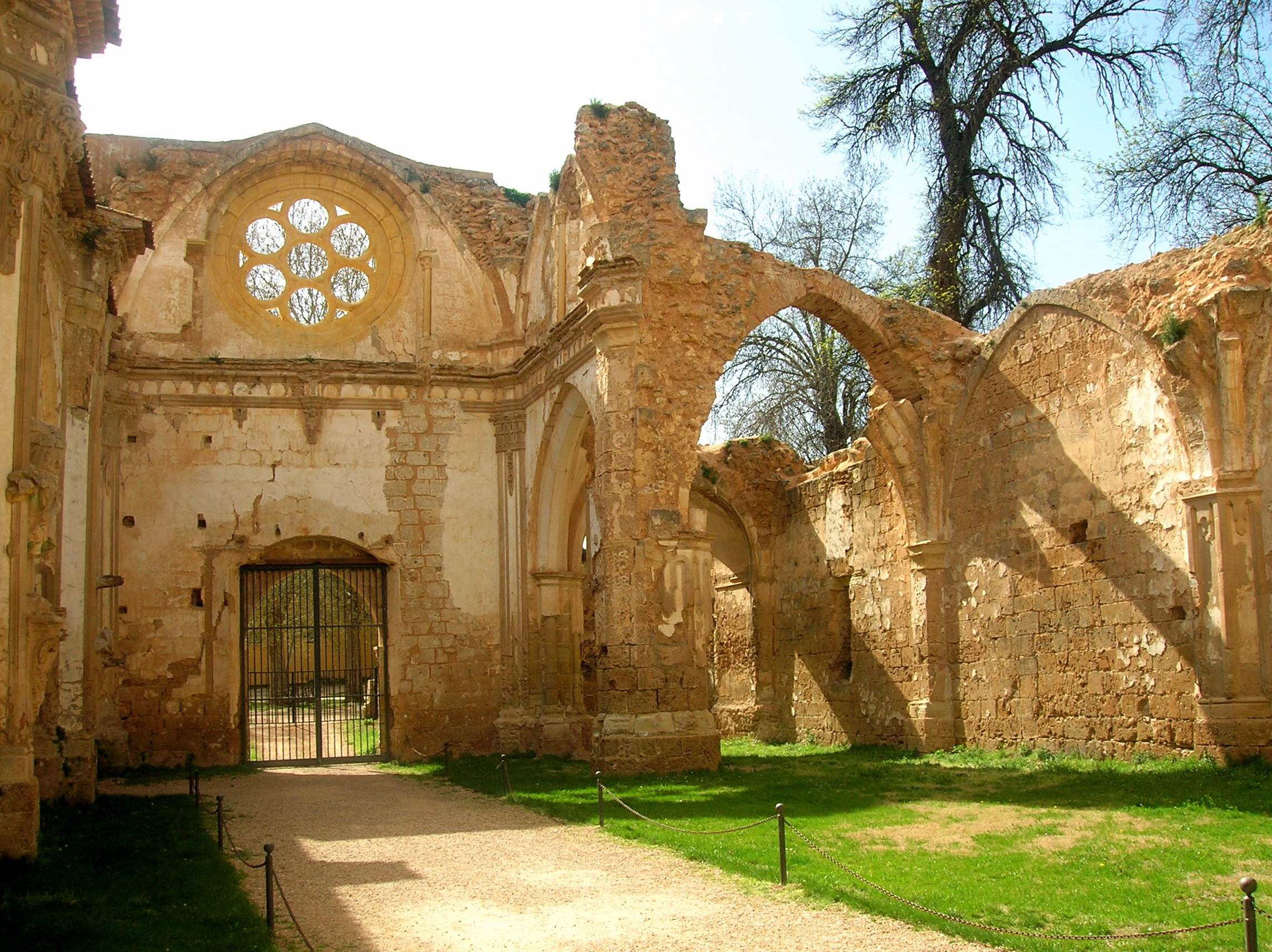 Qaraqalpaqsha: Iglesia del Monasterio de Piedra